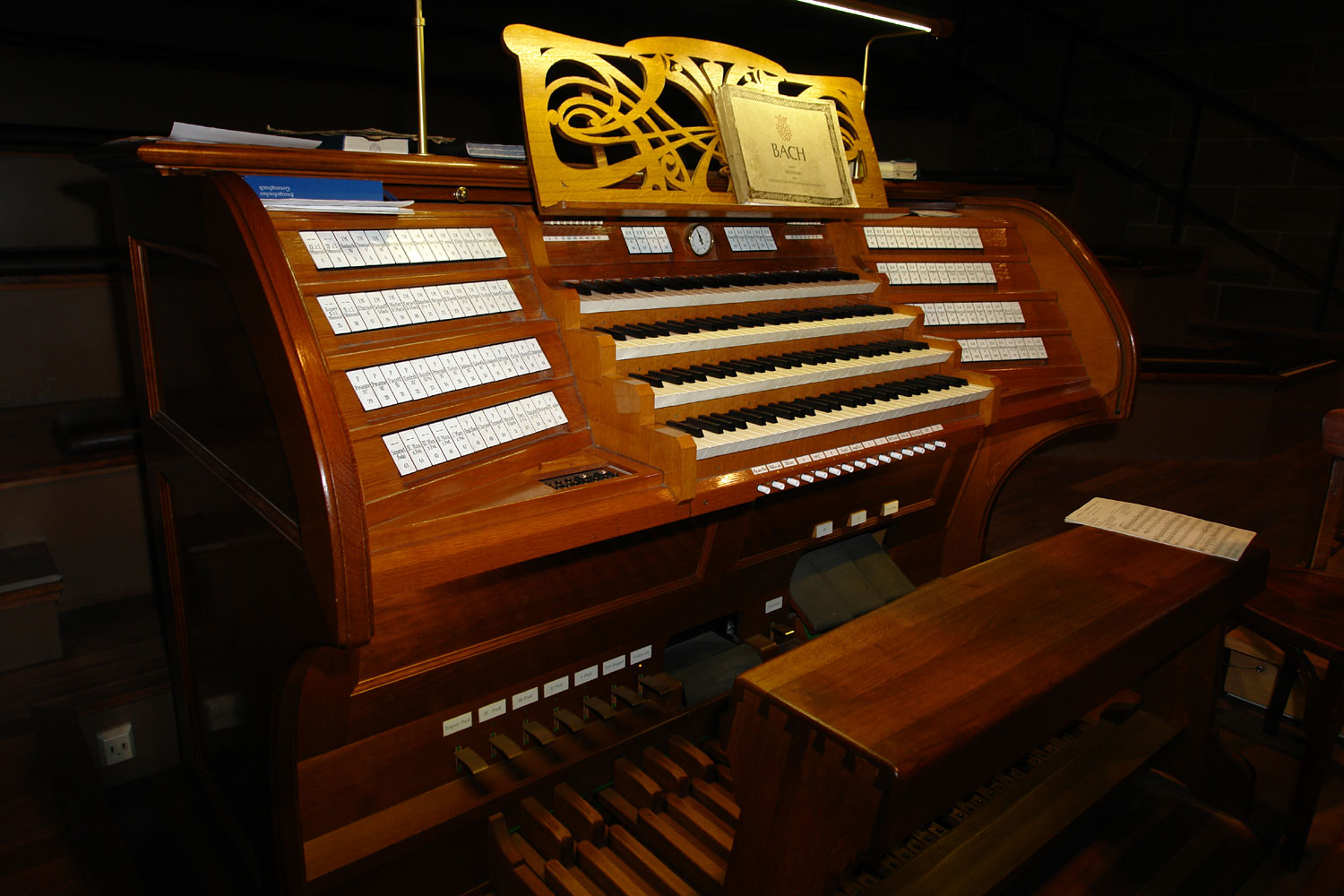 Bremer Dom: Spieltisch der Sauer-Orgel auf der Empore (100 Register)